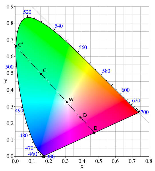 Utilisation du diagramme xyY